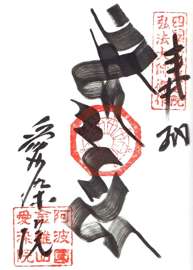 愛染院の刷毛納経